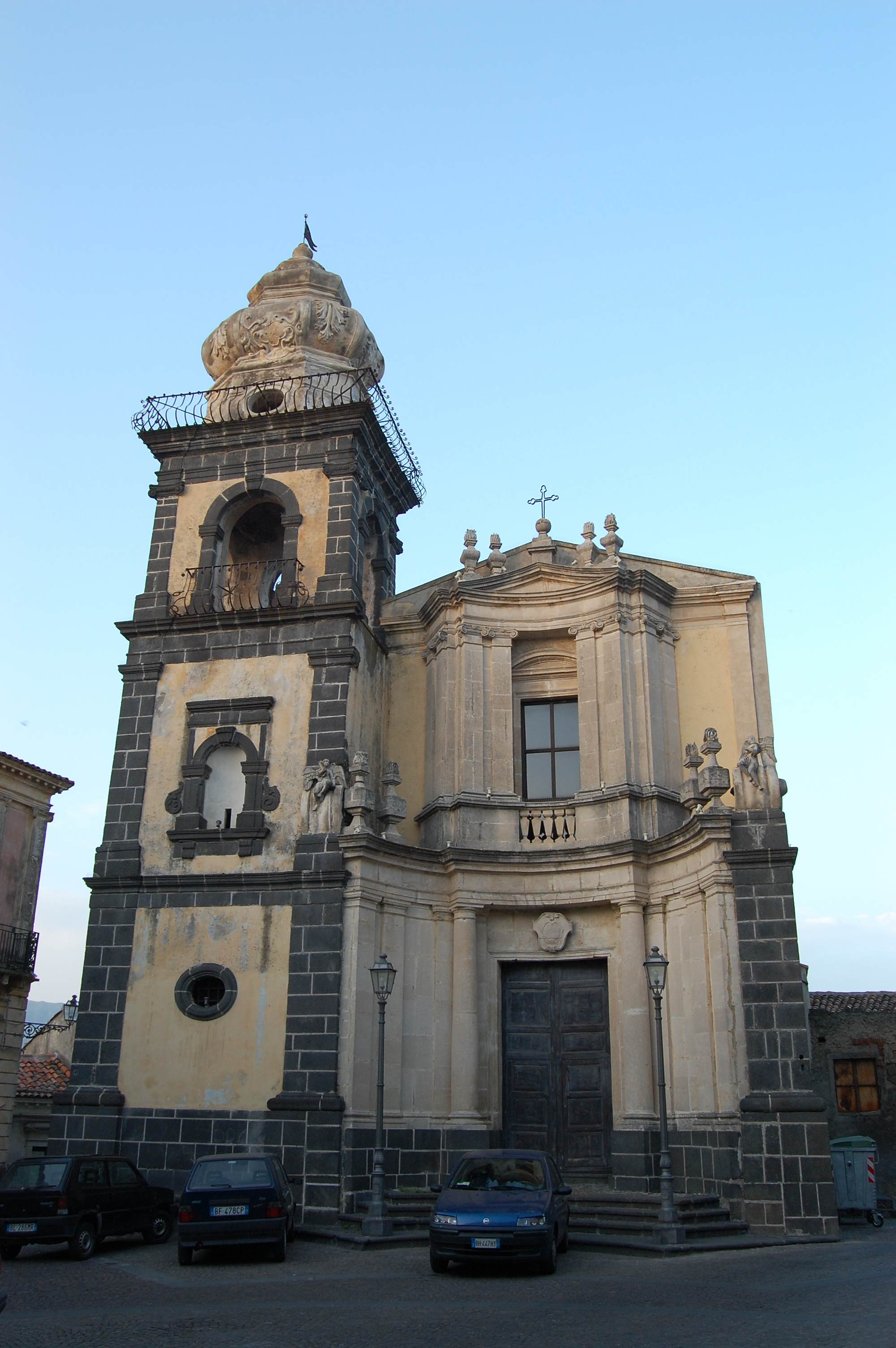 Chiesa di Sant'Antonio, Castiglione di Sicilia, Catania.